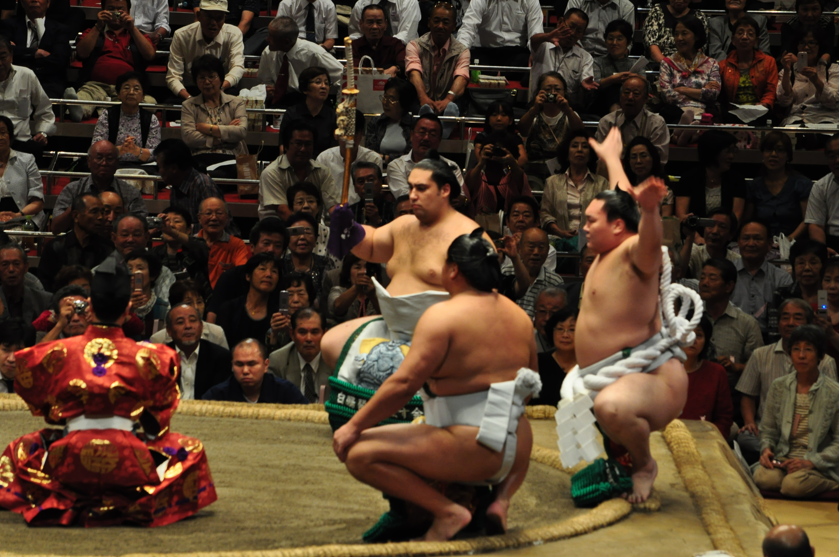 横綱白鵬の土俵入り